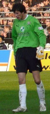 Tomasz Bobel (Torwart Erzgebirge Aue)